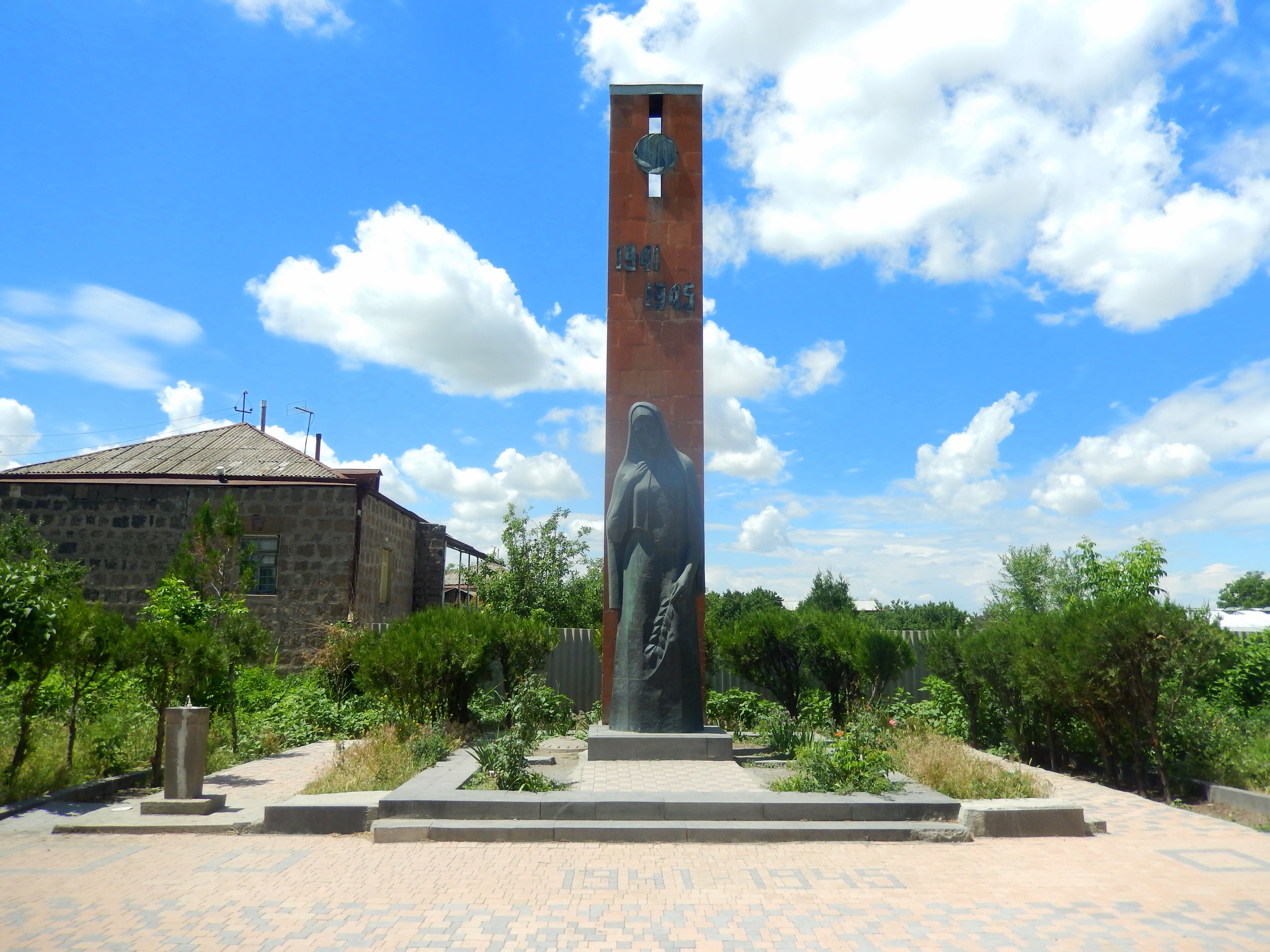 WW2 monument Arevashat, Armavir 26/2